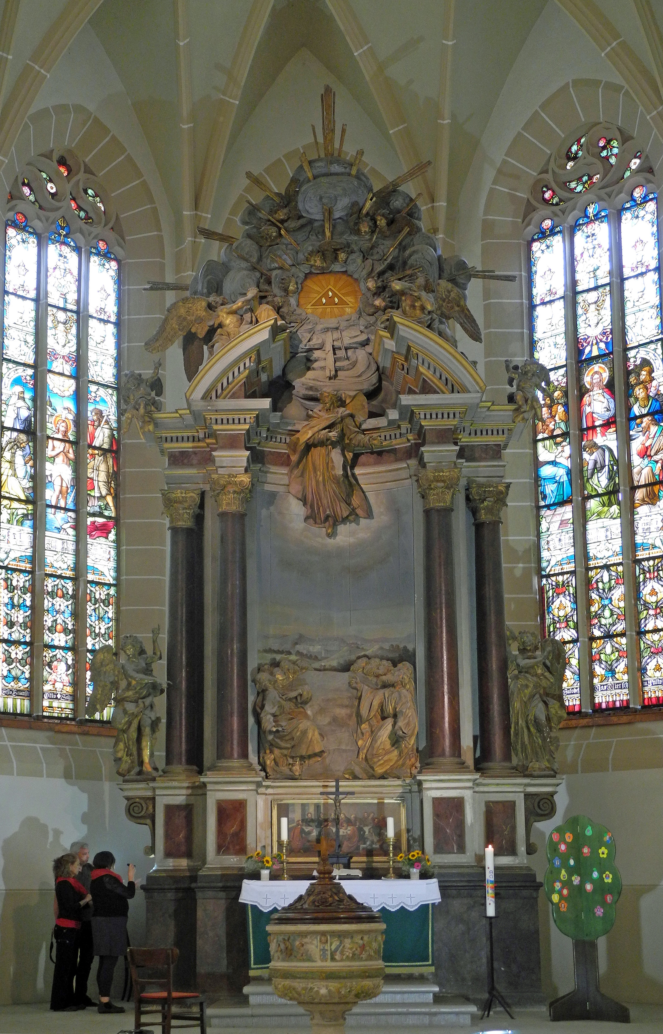 Himmelfahrtsaltar (1714) der Stadtkirche St. Wenzel in Lommatzsch am Kirchplatz - Lommatzscher Altar von Hofbildhauer Paul Heermann (1673–1732). In der Predella ein Abendmahlsbild vom Porzellanmaler Carl Samuel Scheinert (1862).